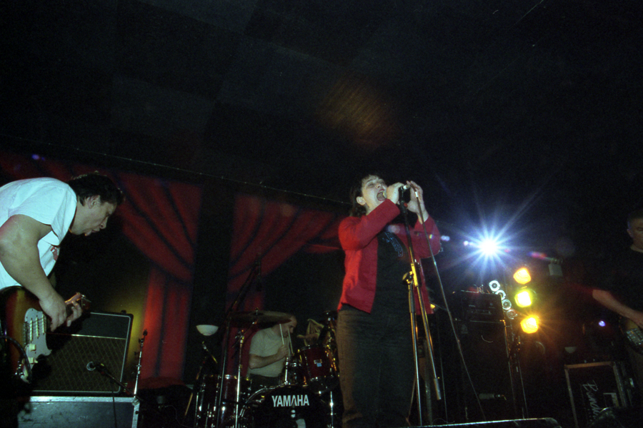 Uzeda au festival All Tomorrows parties en 2004